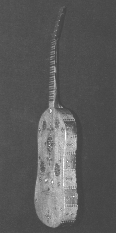 Vihuela